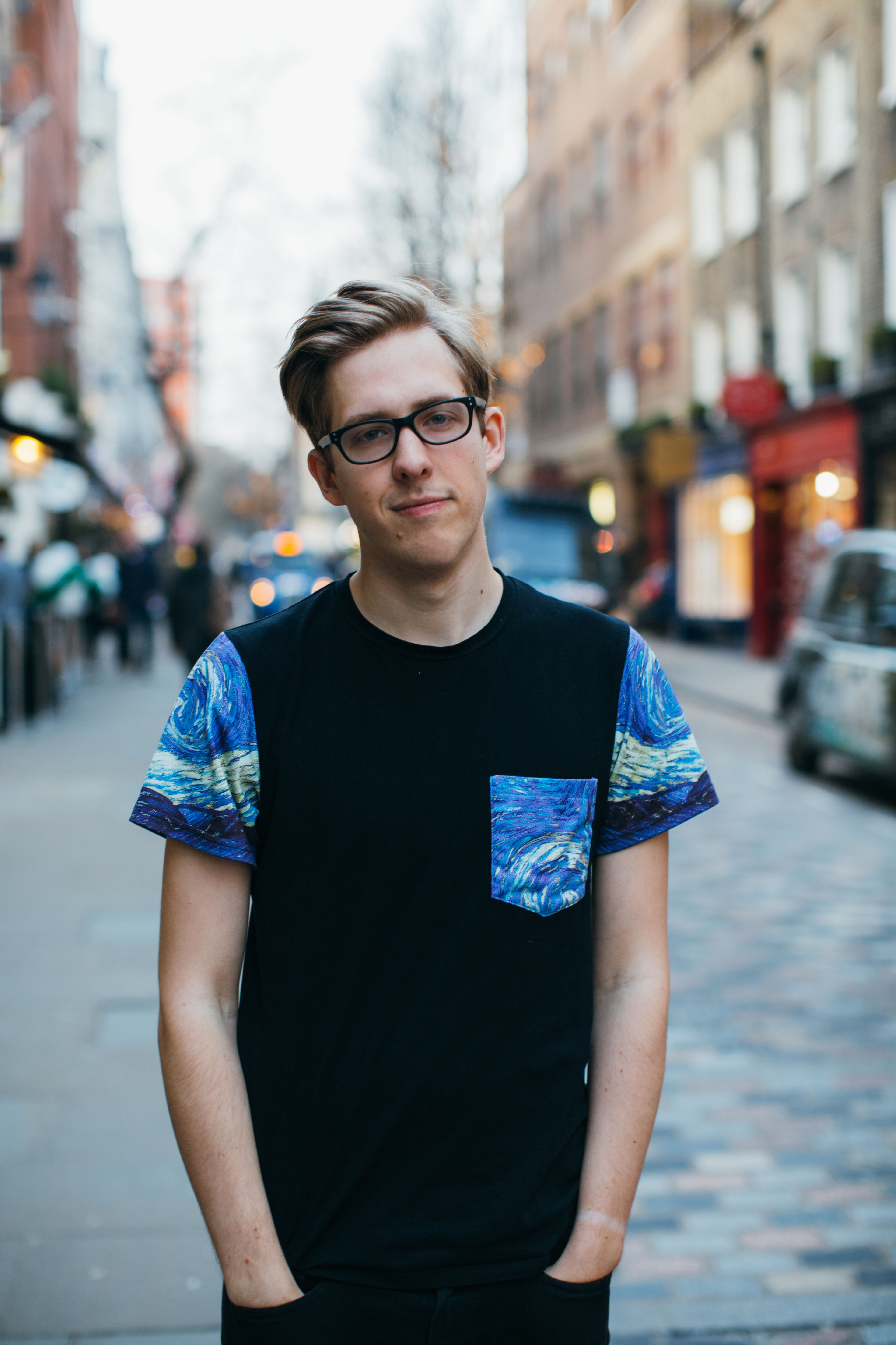 Evan Edinger 03-2016